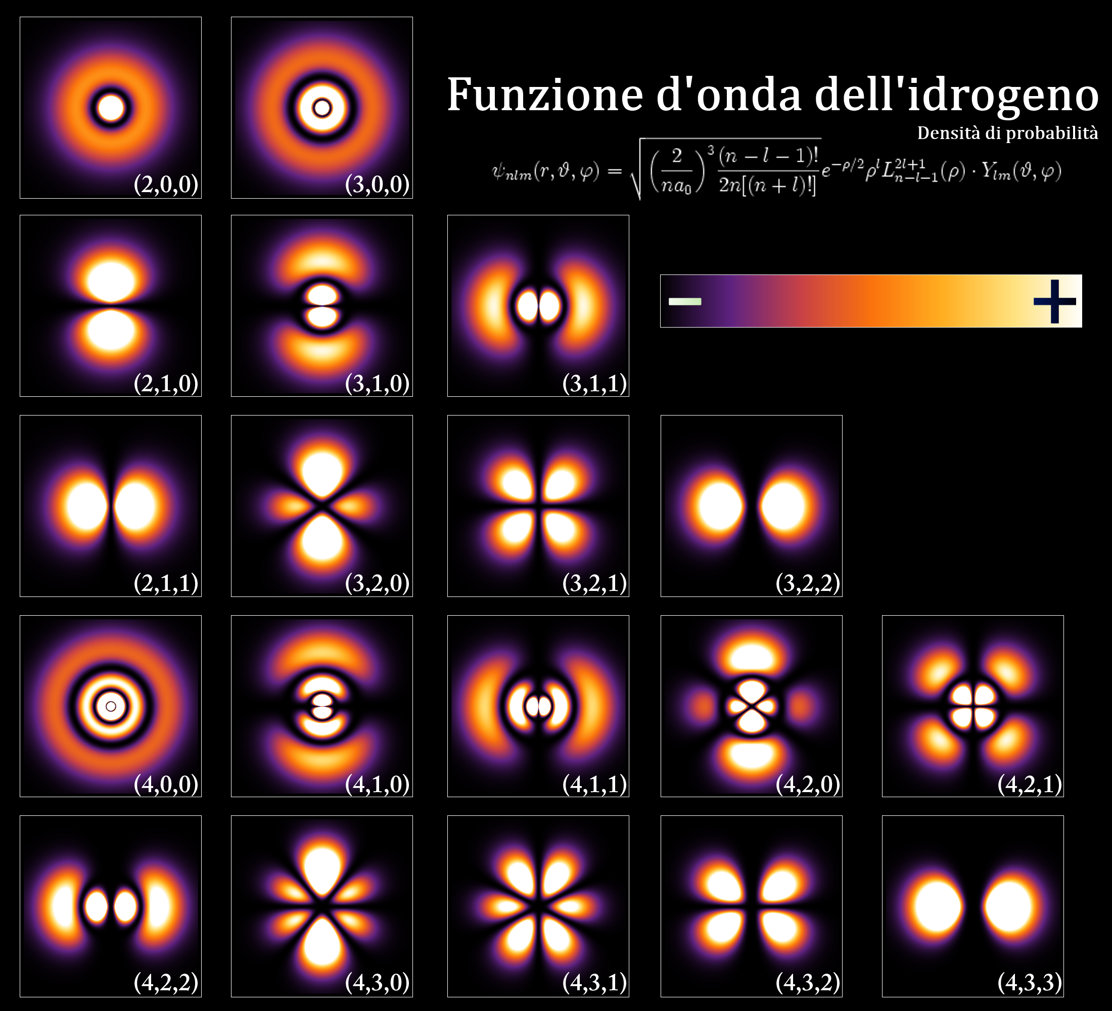 tabella in cui in ciascuna cella è disegnata la densità di probabilità con un colore che ne indica il rispettivo valore. Viene considerata la funzione d'onda elettronica dei primi orbitali dell'atomo d'idrogeno.